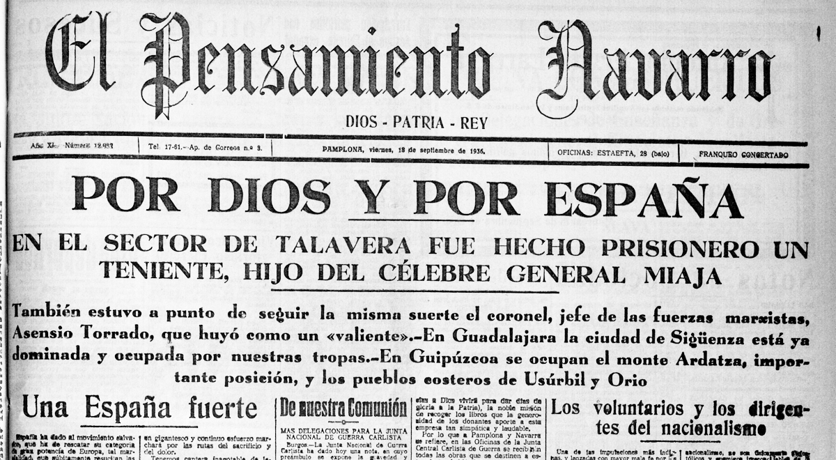 Pensamiento Navarroko 1936ko irailaren 18ko alea, Gipuzkoako frontearen berri emanez